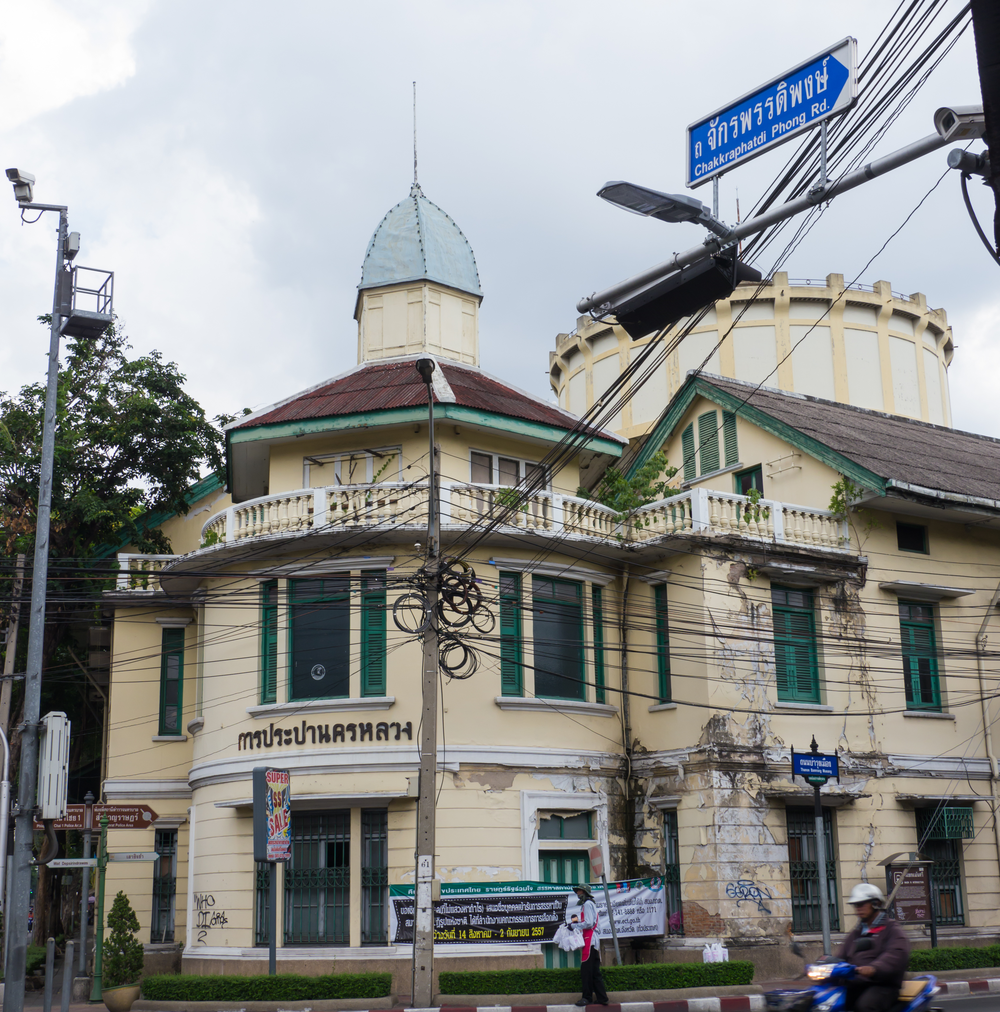 สำนักงานประปาสาขาแม้นศรี (เดิม)